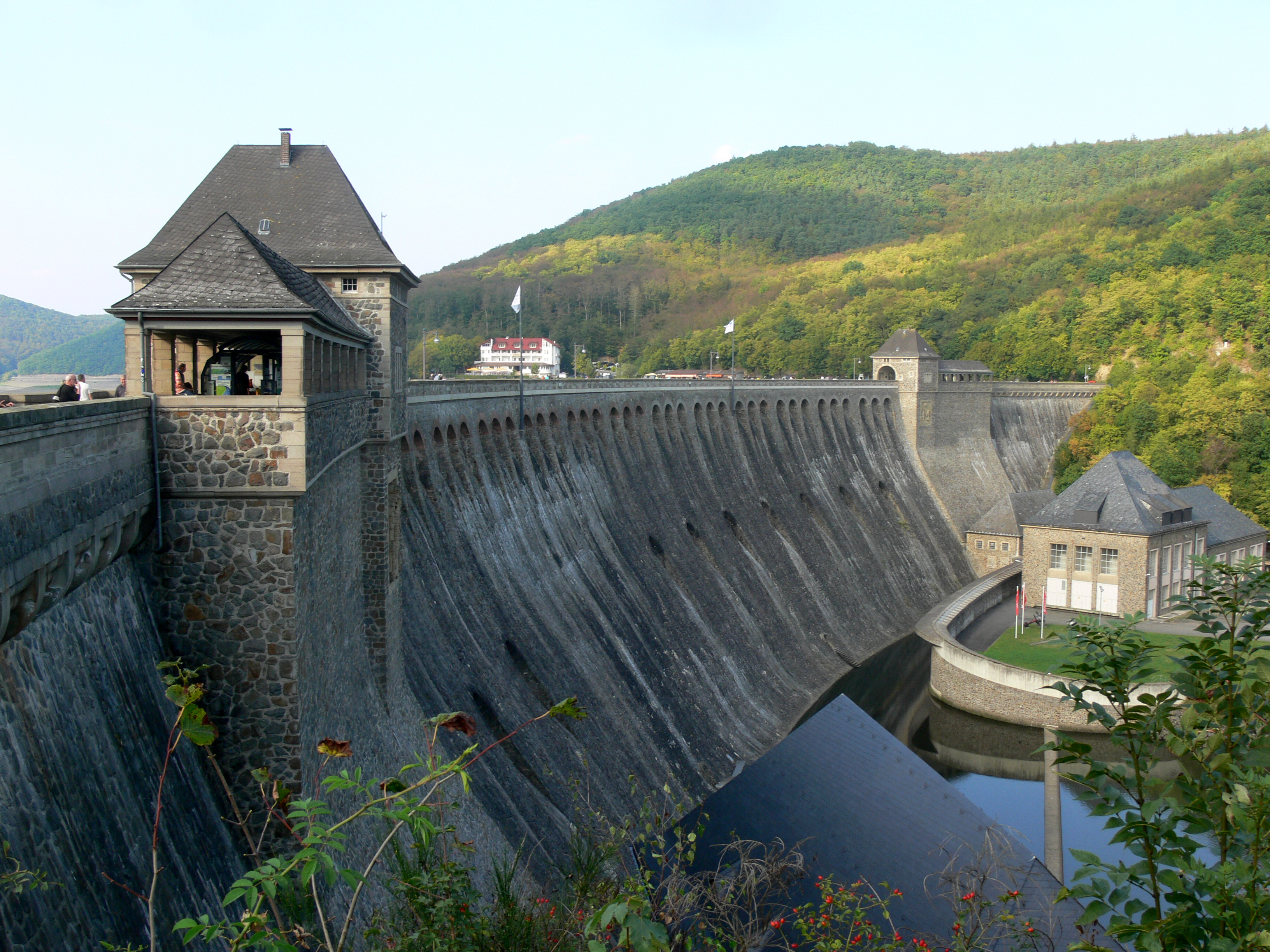 Staumauer und Turbinenhaus